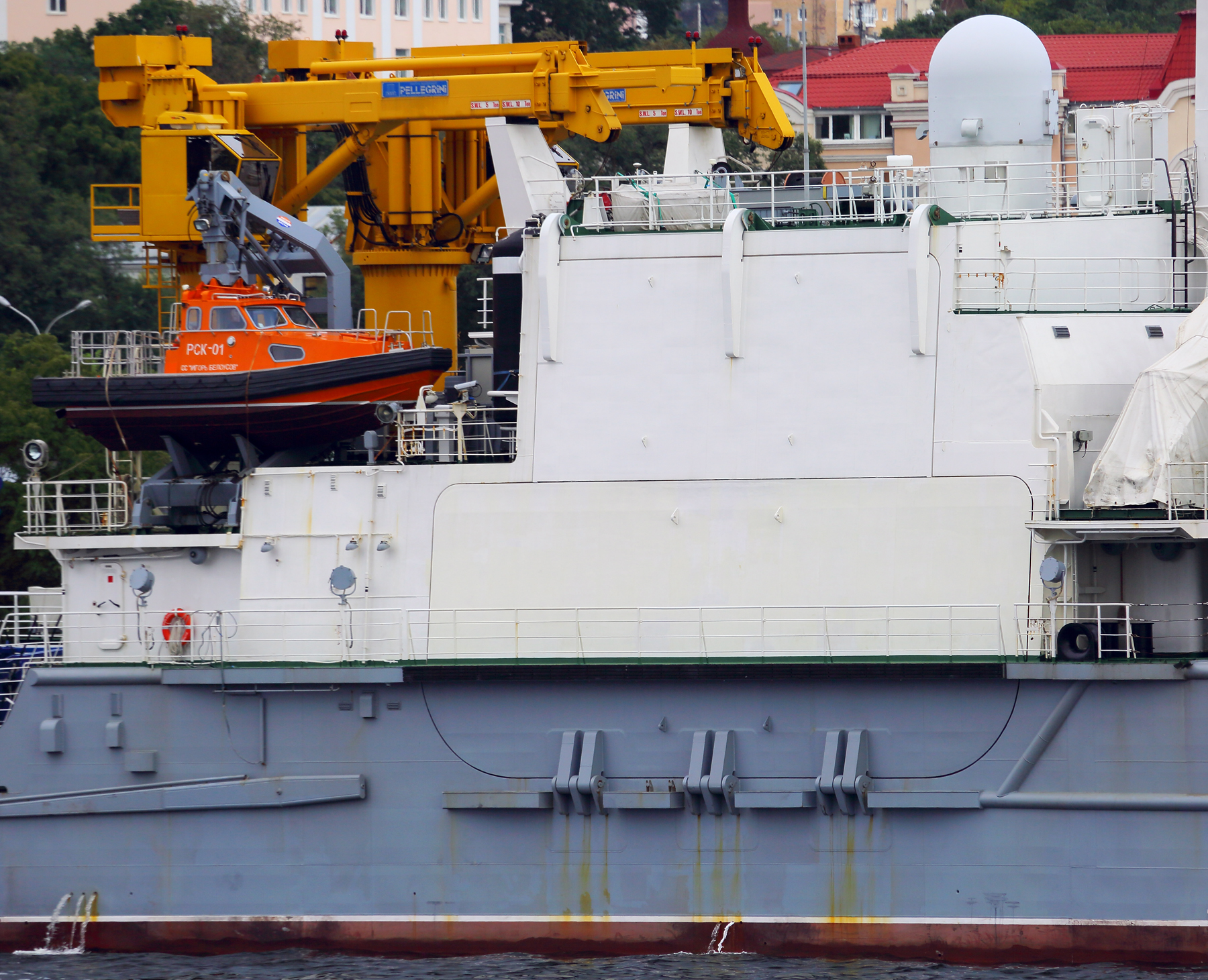 Створки комплекса ГВК-450 на СС "Игорь Белоусов"